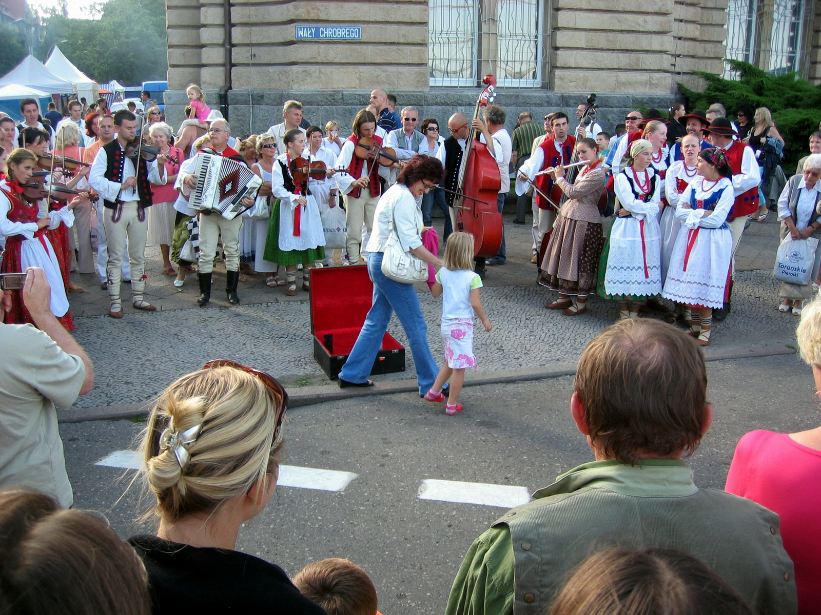 Górale w Szczecinie / Gorals (Highlanders) in Szczecin